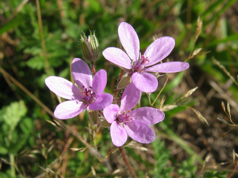 Drüsiger Reiherschnabel (Erodium lebelii)